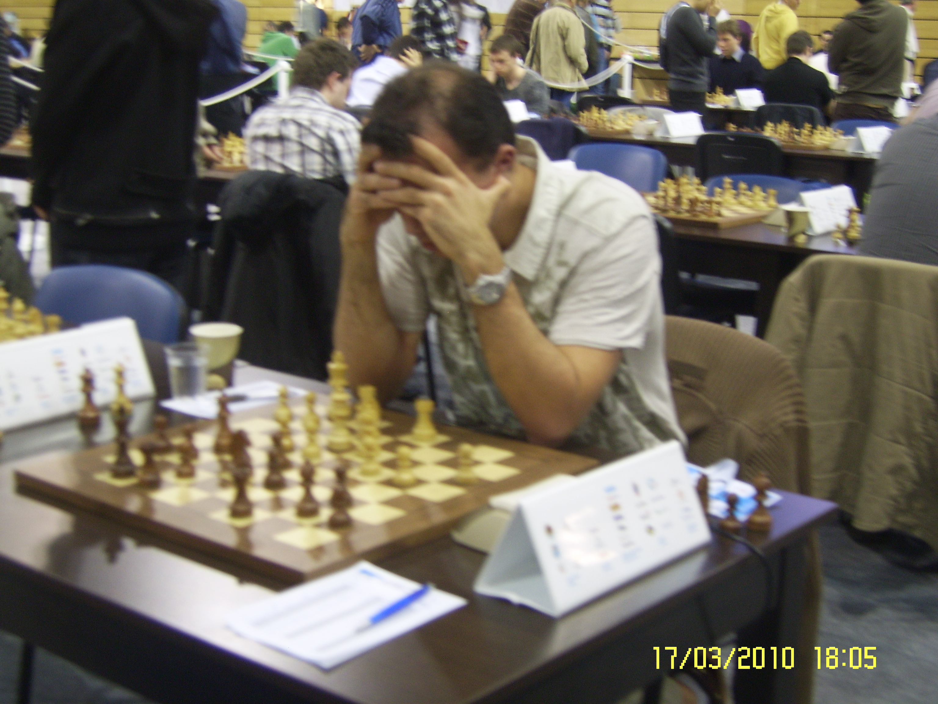 Bosanskohercegovački velemajstor Ivan Sokolov na 11. Europskom pojedinačnom prvenstvu u šahu za muškarce i žene 2010. g. u Rijeci